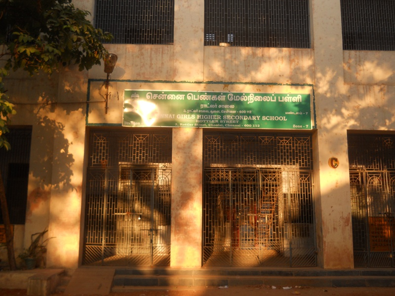 சென்னை பெண்கள் மேனிலைப் பள்ளி, இராட்லர் தெரு - மேல்நிலை வகுப்புகள் கட்டிடம் - ஒரு மாலைப் பொழுதில்